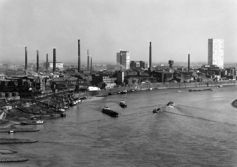 Rheinansicht des Werkes Leverkusen der Farbenfabriken Bayer. Rechts im Bild das 122 m hohe 33-geschossige Bayer Hochhaus.